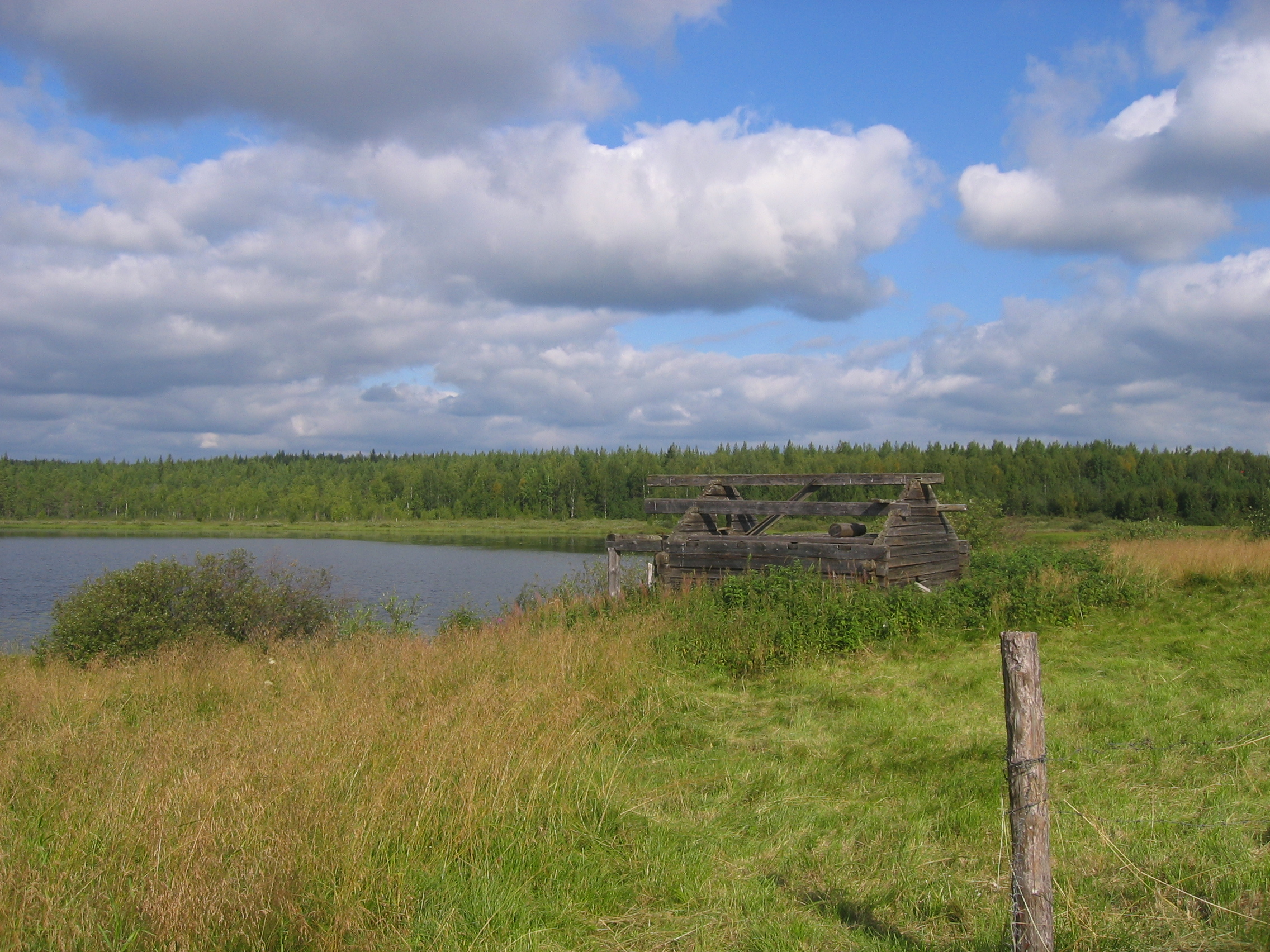 Vanha kyly Tollonjoella, Hukkalantermällä, Vuokkiniemi 2007